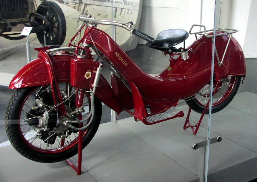 Megola motorcycle